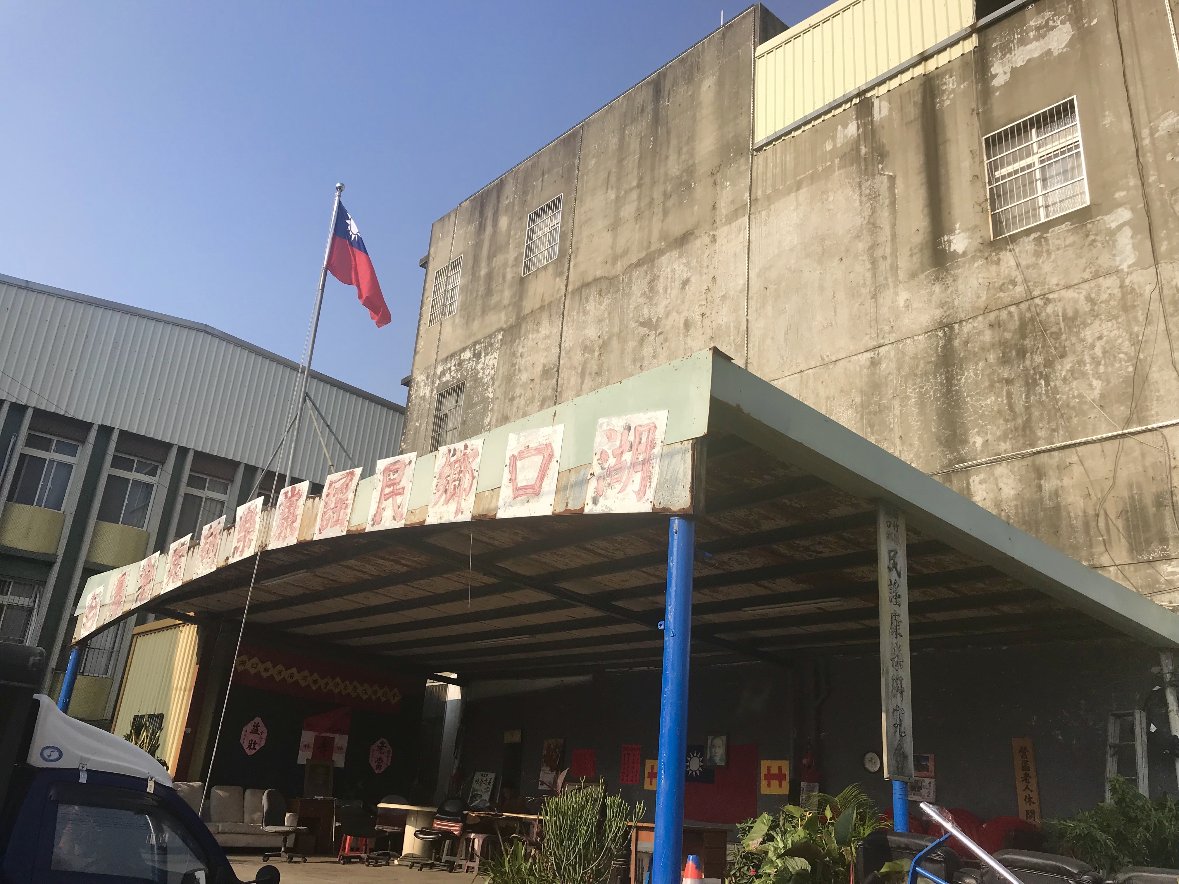 中文（台灣）: 新竹縣湖口鄉中興村黃昏市場司令台